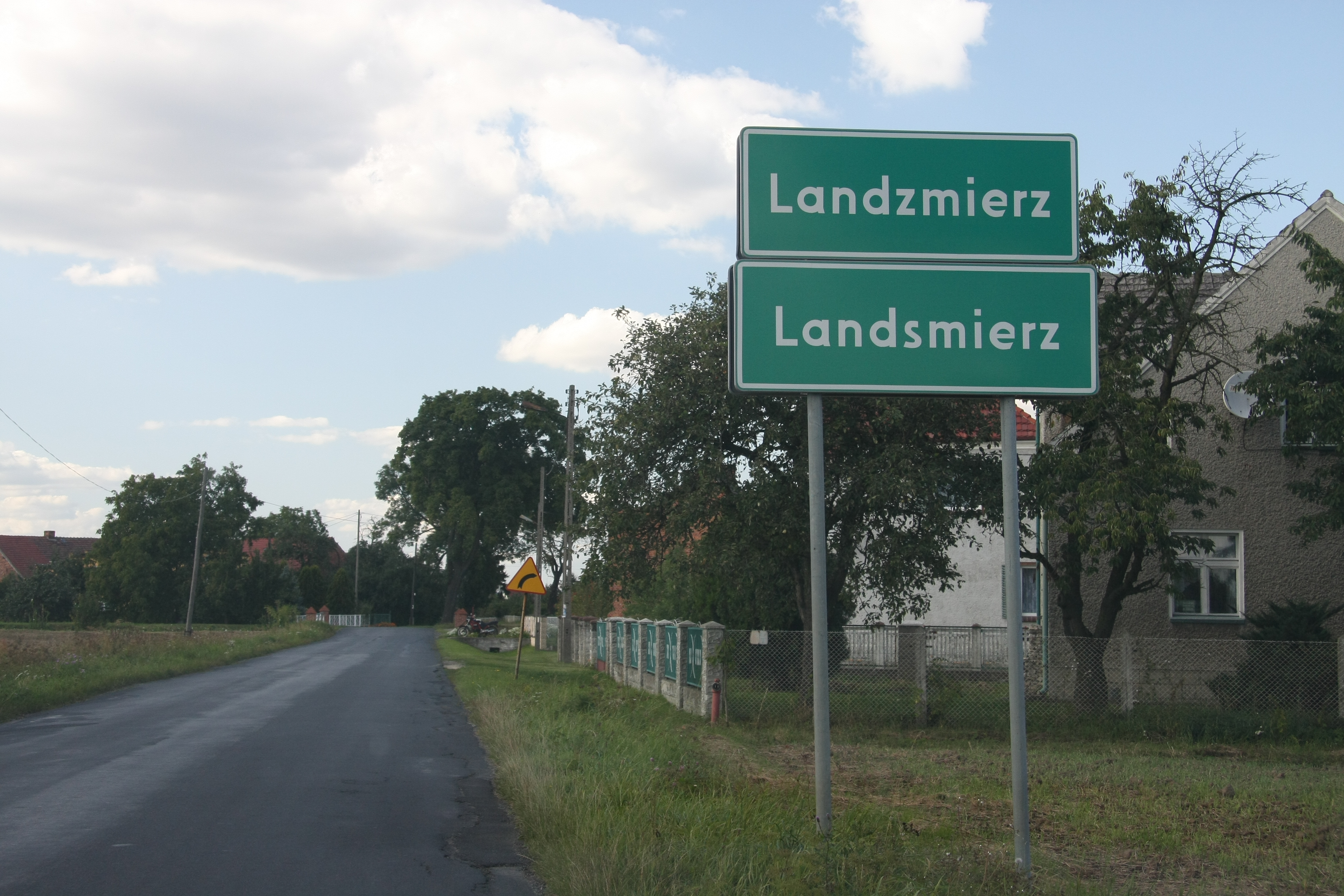 Dwujęzyczna tablica z nazwą przed wjazdem do Landzmierza